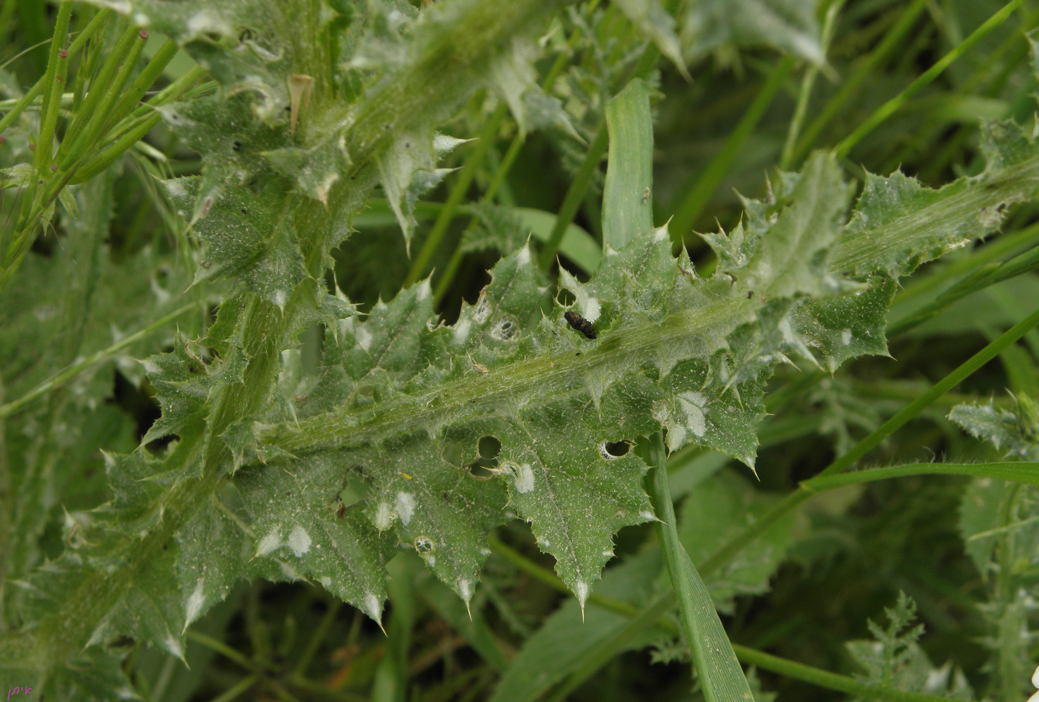 Carduus argentatus - leaf עלה של קרדה מכסיפה